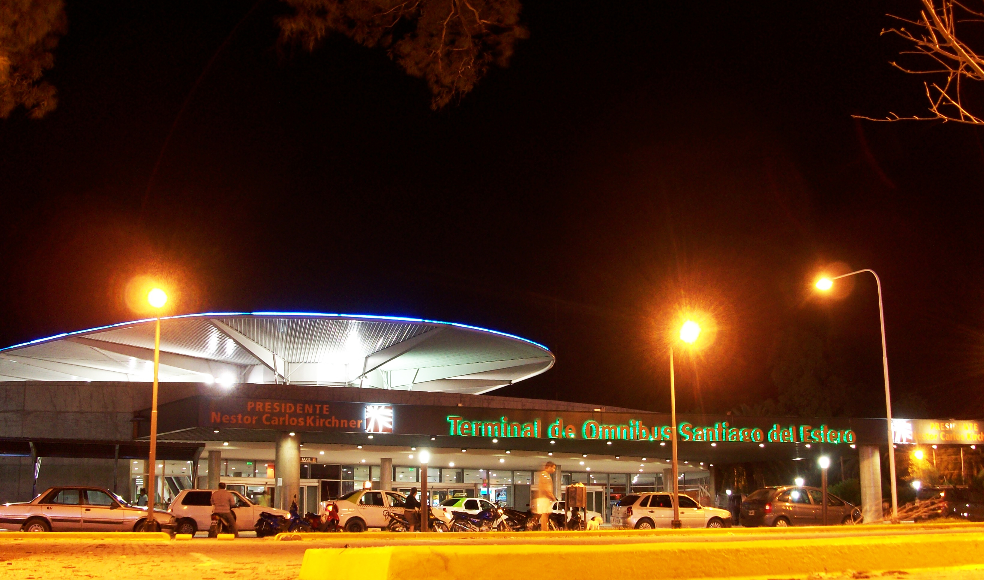 Entrada a la terminal de ómnibus de Santiago del Estero sobre calle Chacabuco